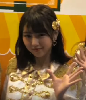 熊崎晴香です。